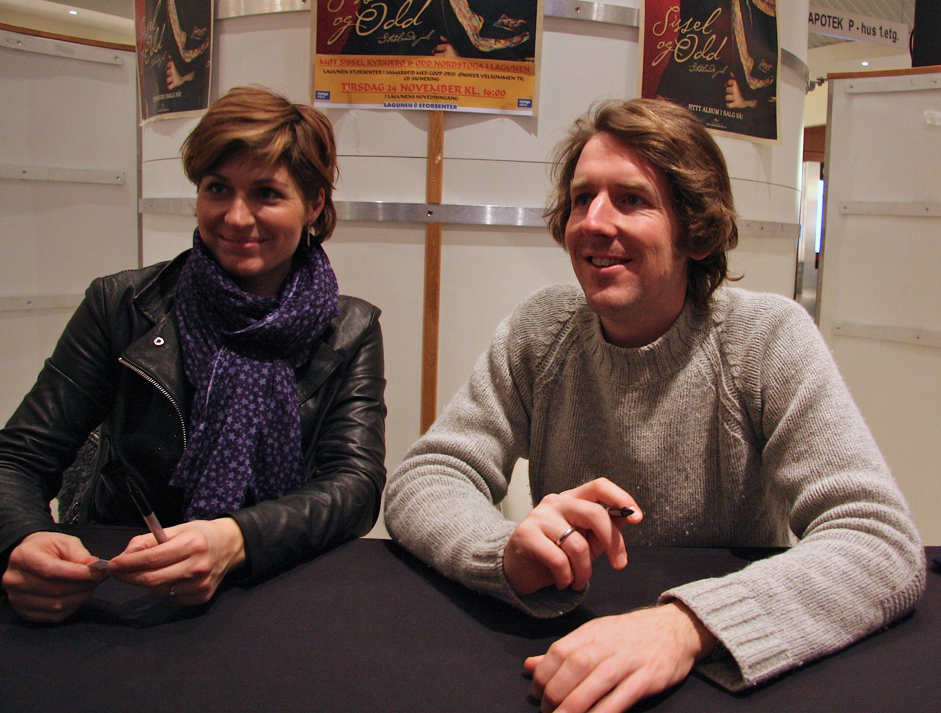 Sissel Kyrkjebø and Odd Nordstoga